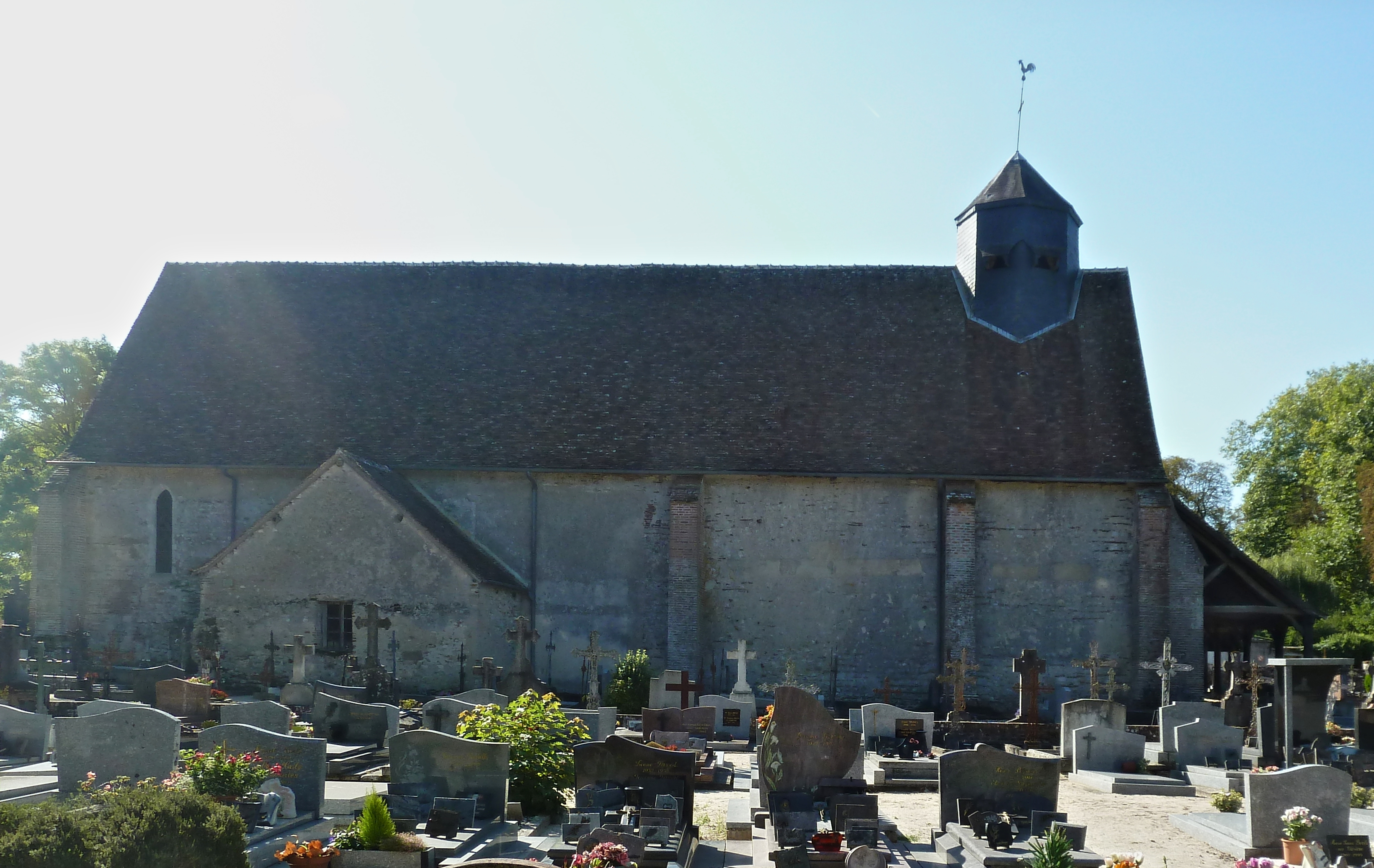 L'Eglise St Barthélémy de La_Ferté-Beauharnais Loir-et-Cher